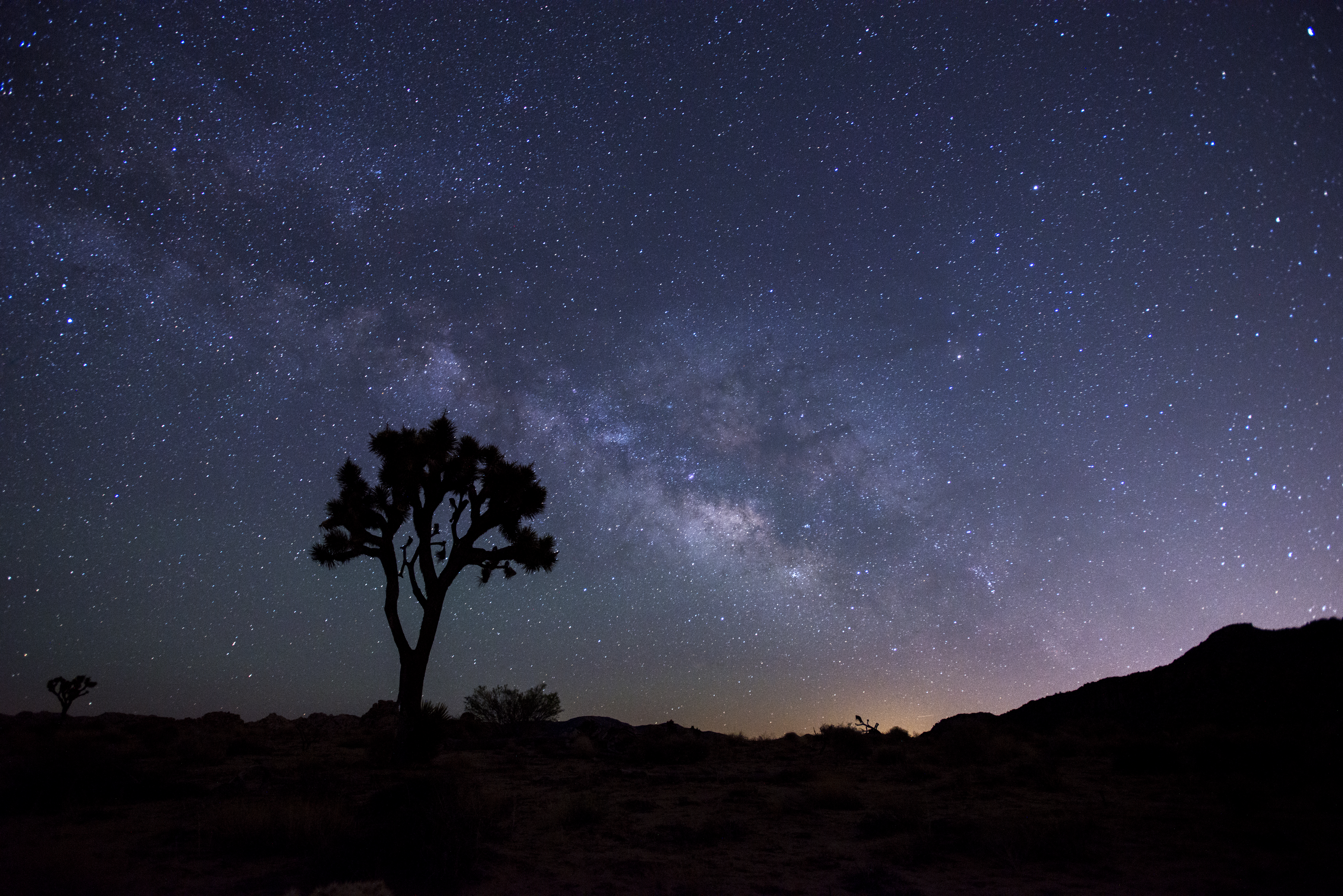 NPS/Lian Law